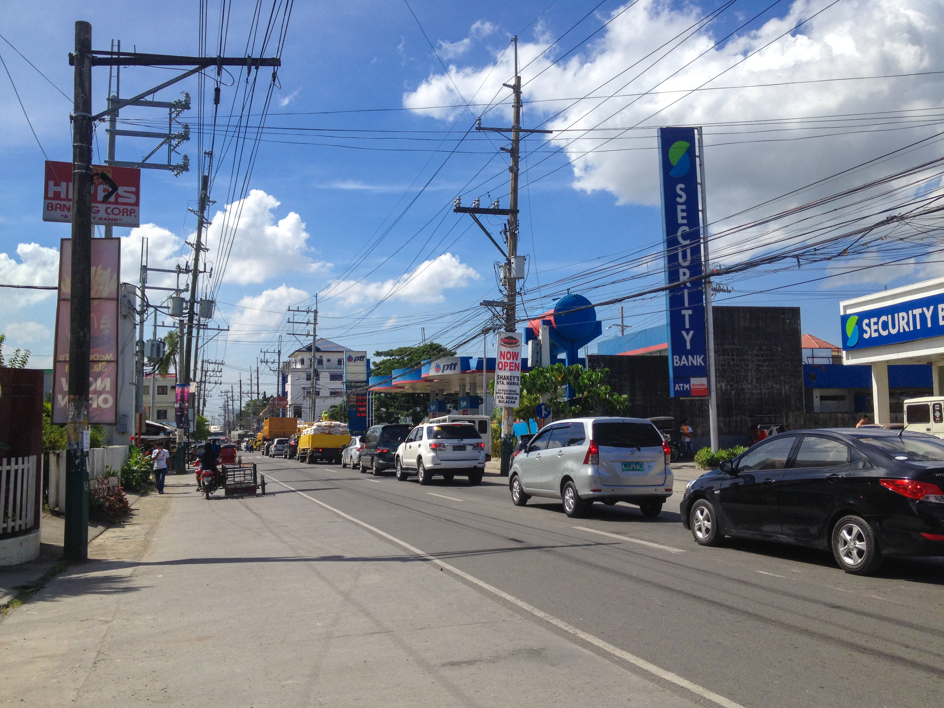 Governor Fortunato F. Halili Avenue, Barangay Bagbaguin, Santa Maria, Bulacan, Philippines